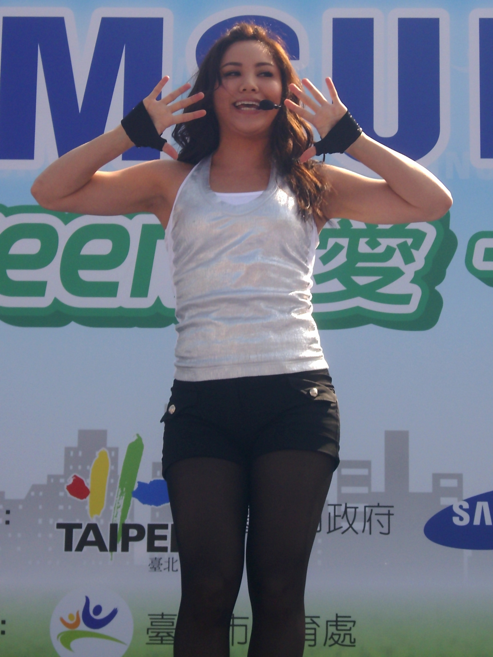 中文（台灣）: 2009年三星活力路跑，高以愛現場演唱。Bân-lâm-gú: 2009-nî Sam-sing Ua̍h-li̍k Lōo-pháu, Ko Í-ài hiān-tiûnn ián-tshiùnn.